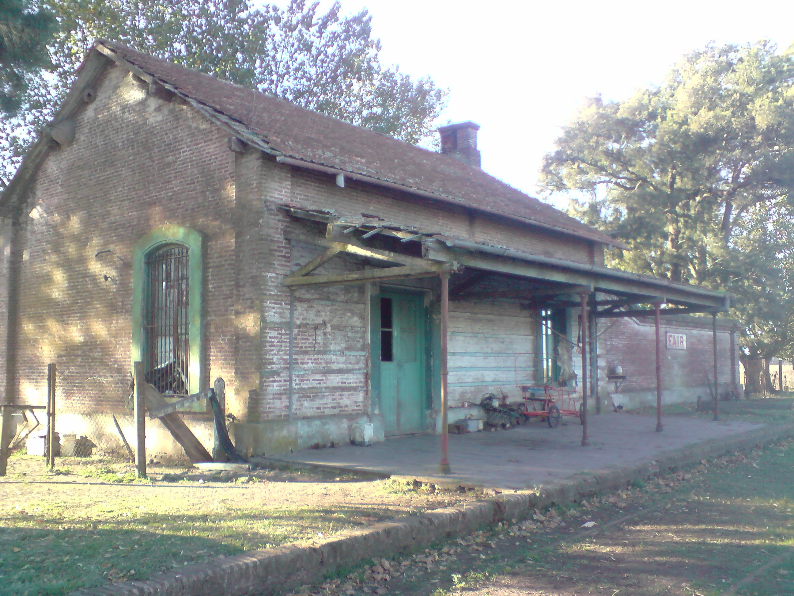 Estacion Fair.